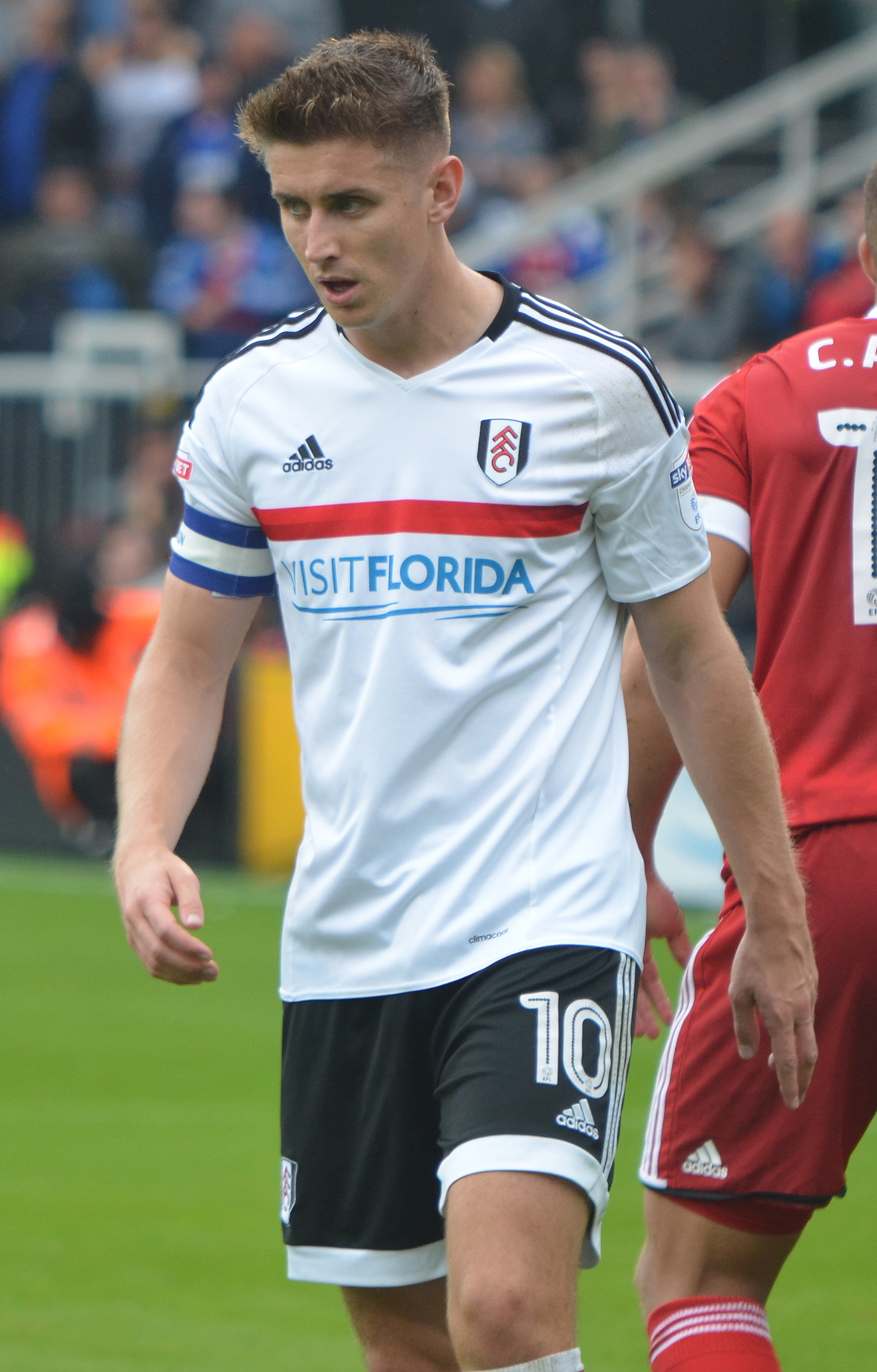 Tom Cairney (Fulham FC)